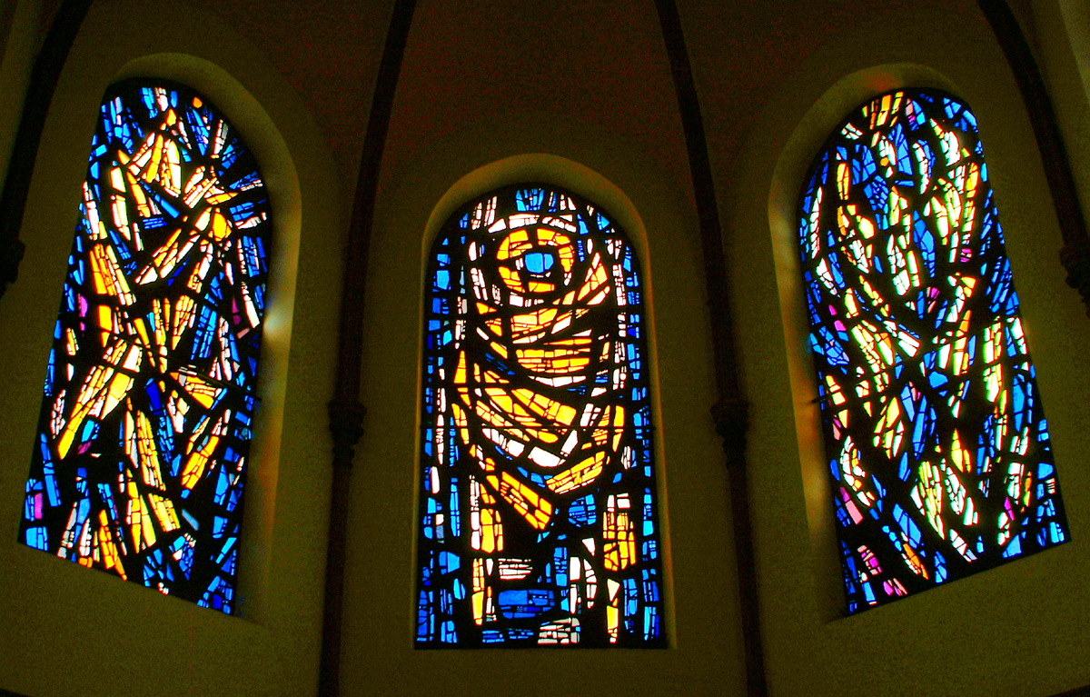 Sie haben ein besseres Bild? Sogar ein historisches Dokument als Bild(ungsförderung)? Zeigen Sie' s uns. Stiften Sie es, allen Menschen.